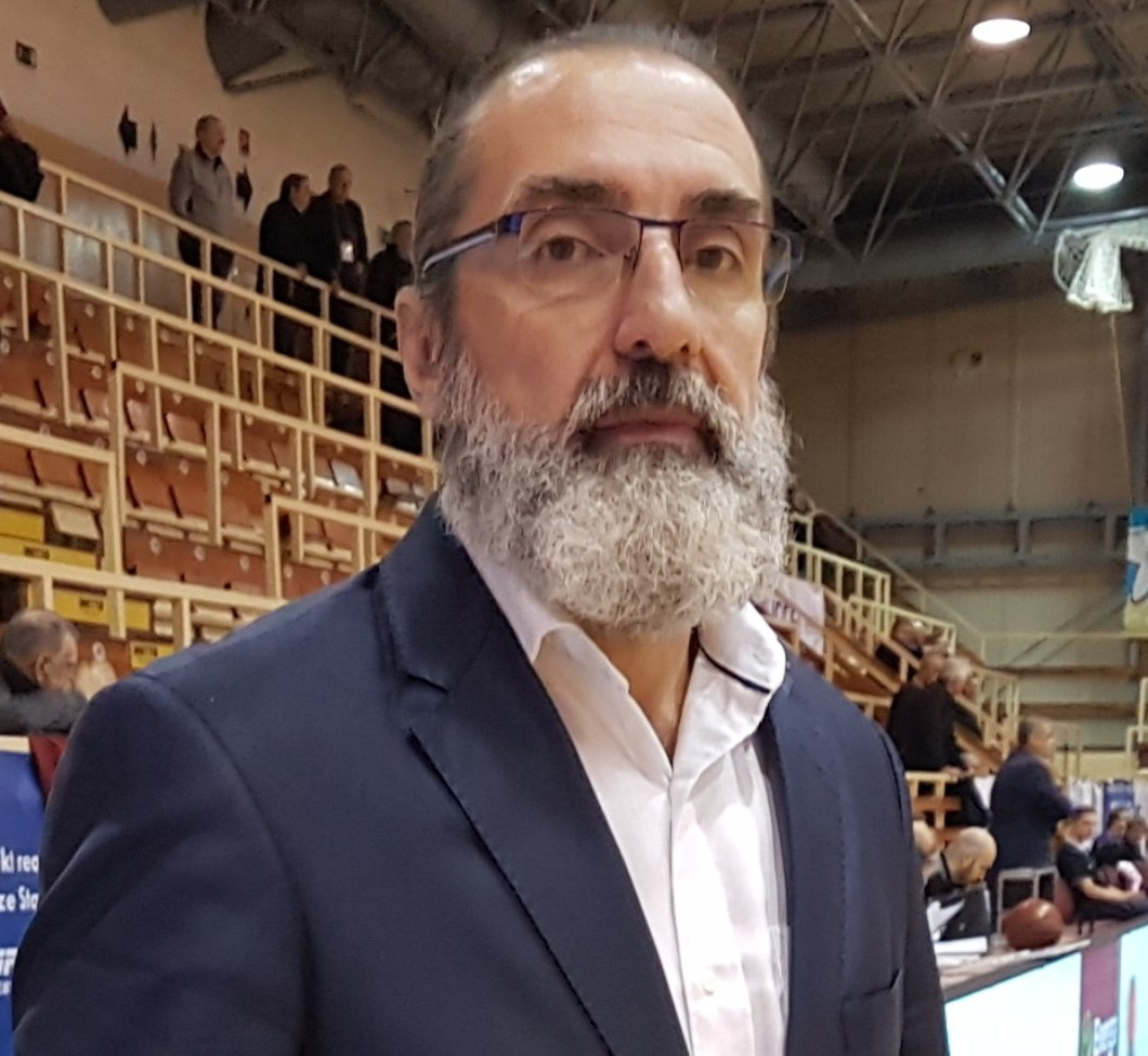 Jacek Winnicki. Stargard